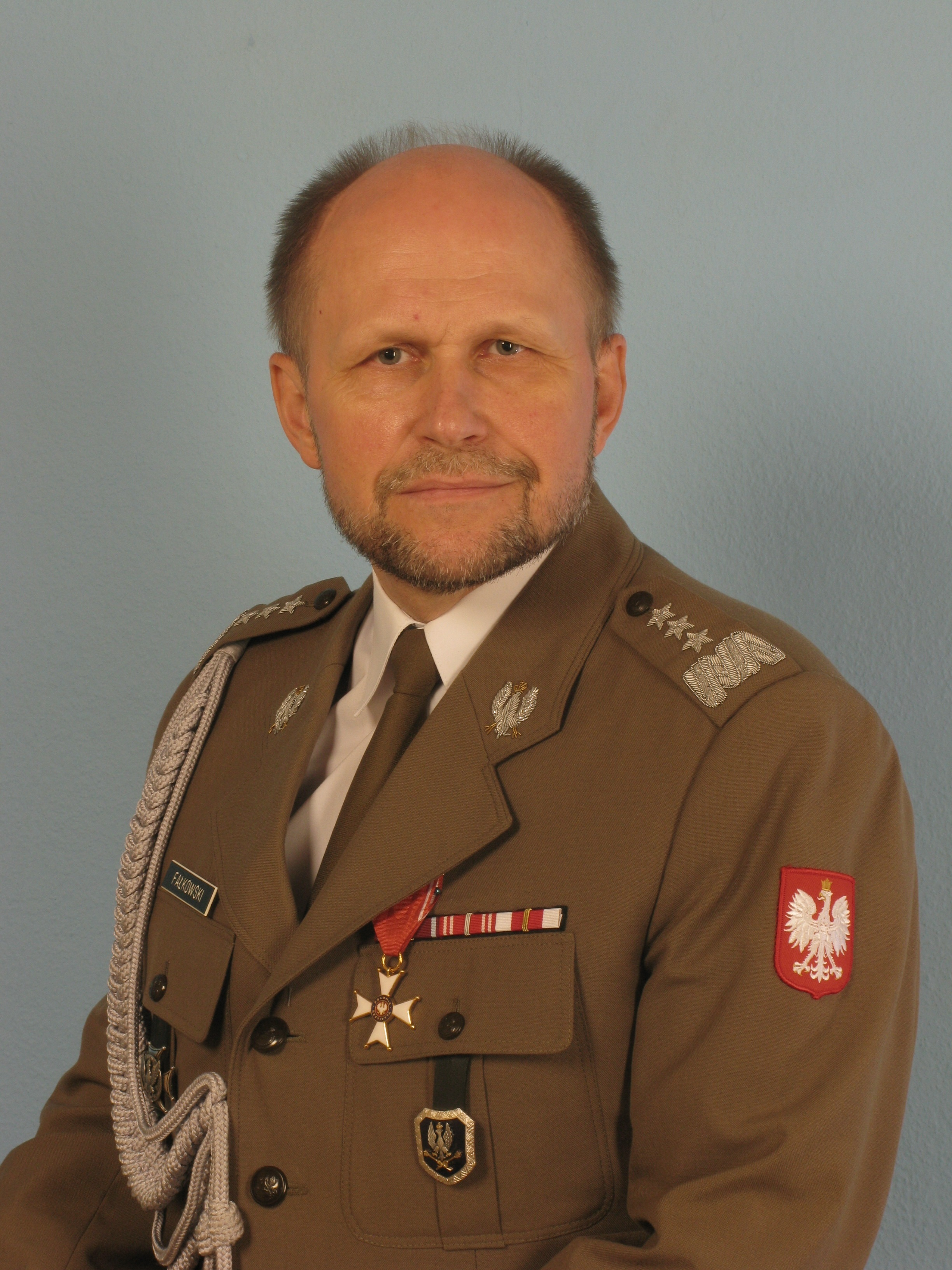 Generał Broni Andrzej Fałkowski